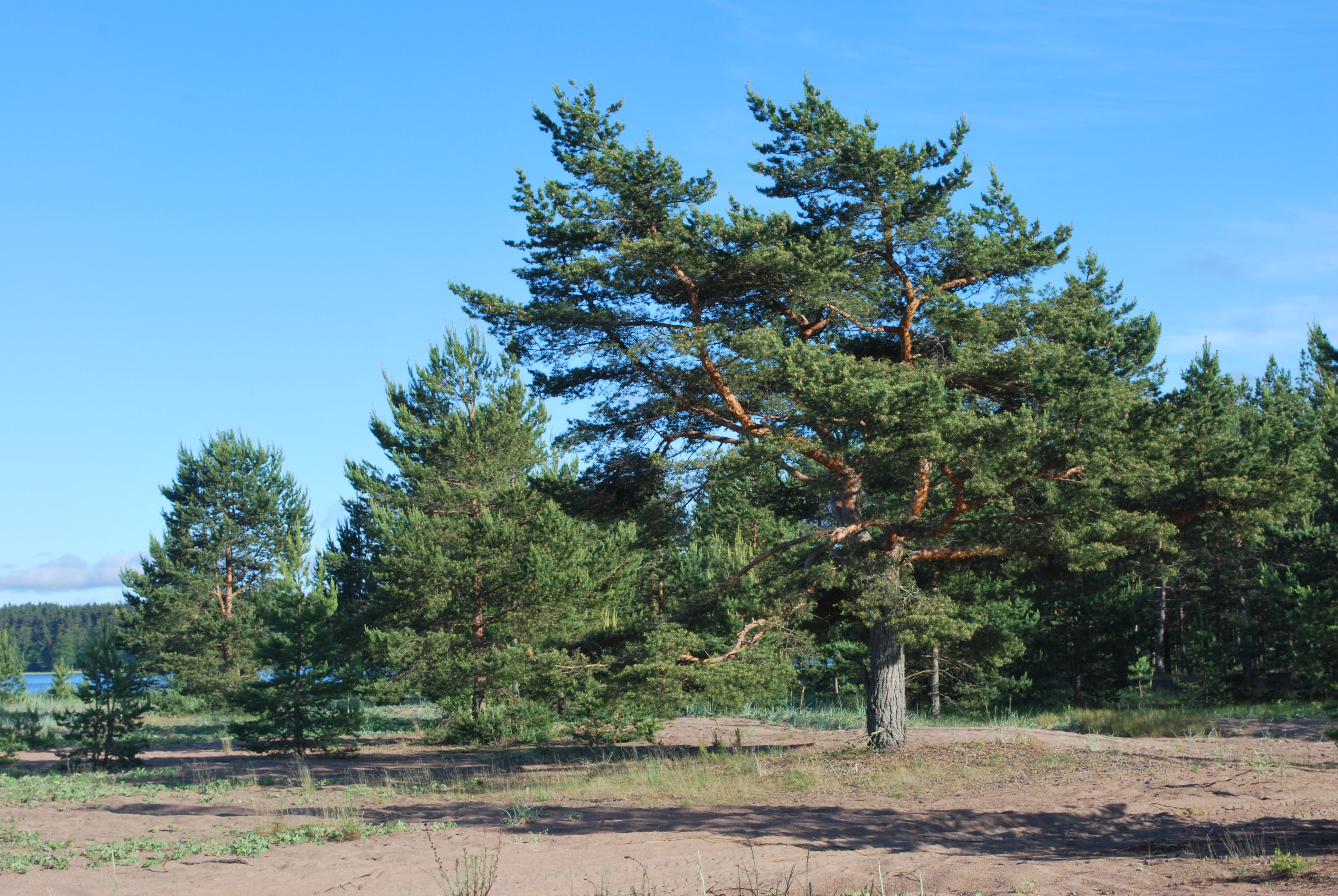 Побережье полуострова Киперорт